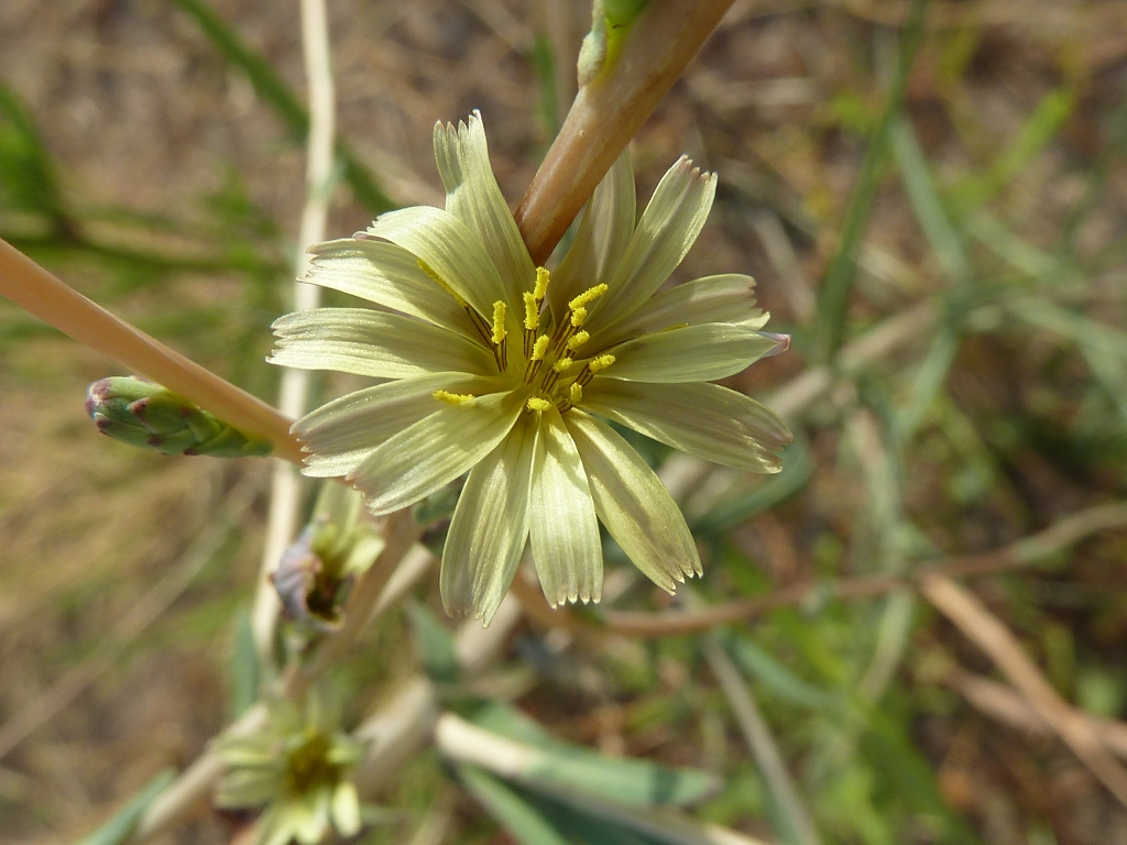 Lactuca saligna (Escarolilla) : Capítulo de lígulas pentalobuladas - La Huerta, Albatera (Alicante, España)